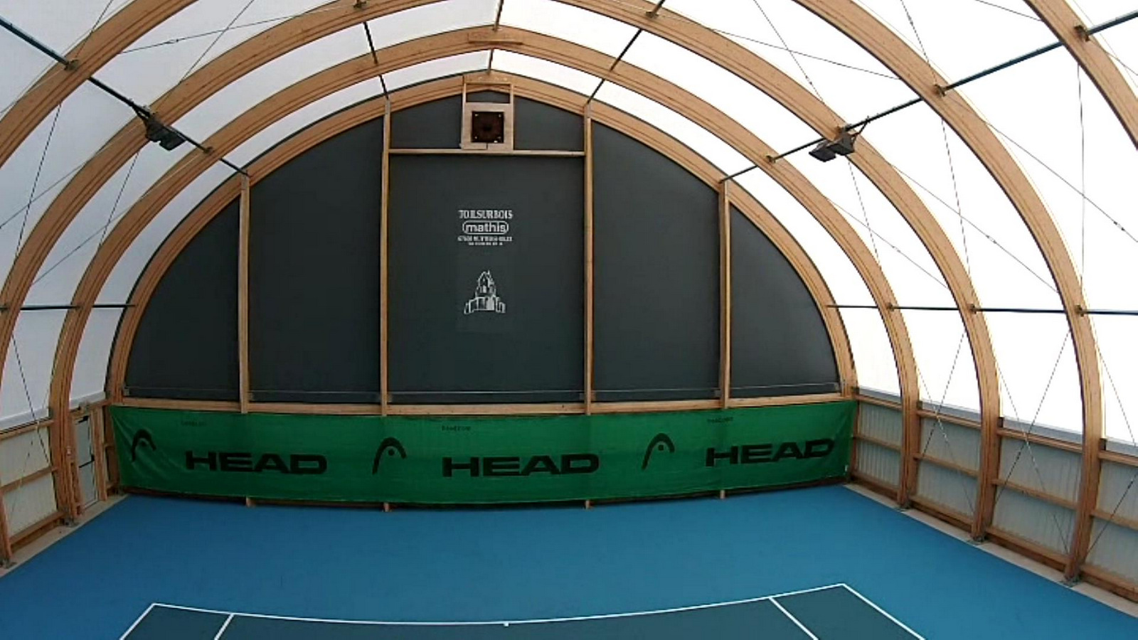 un nouveau court